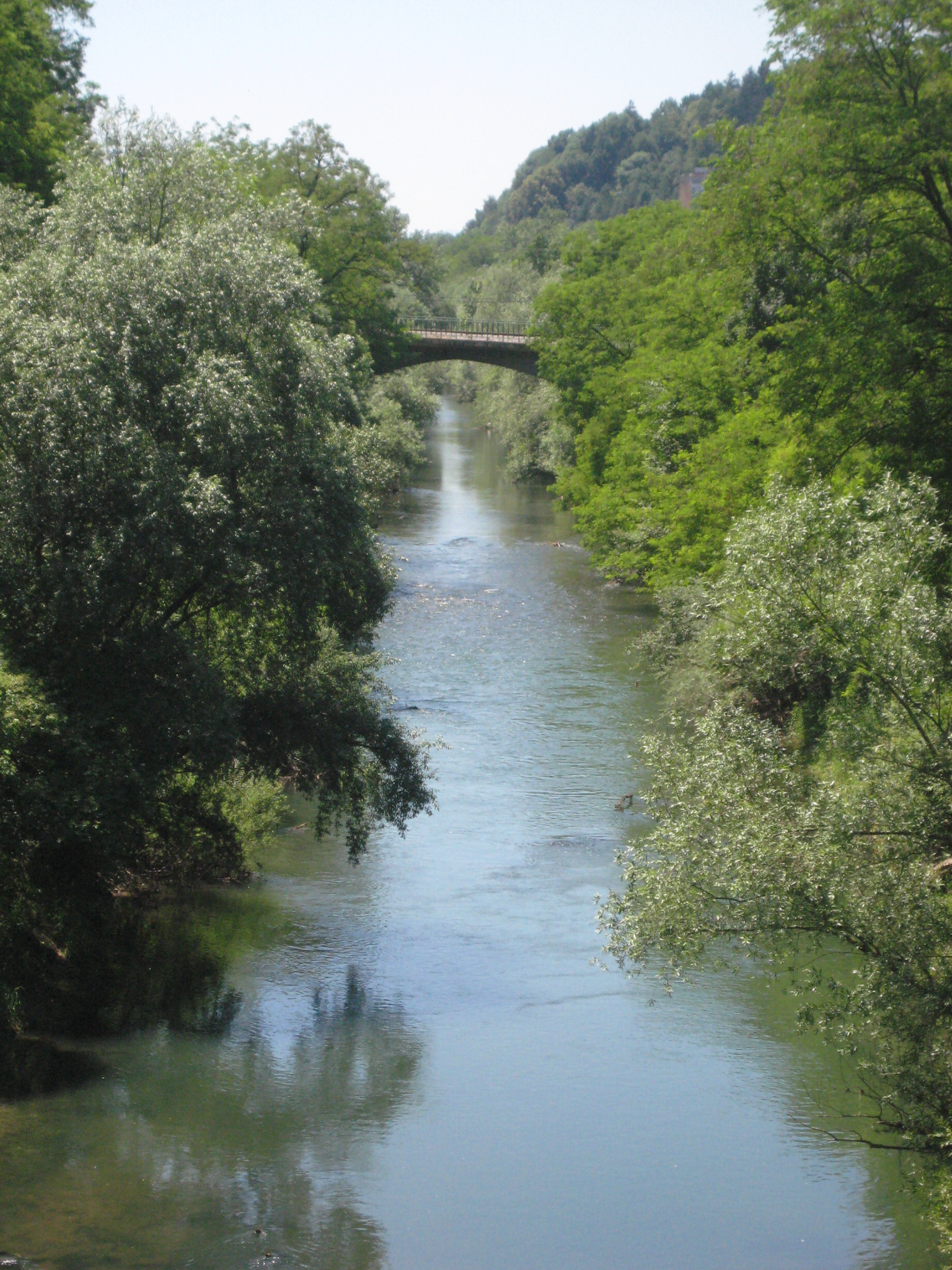 Železniški most - Gruberjev prekop - Ljubljana